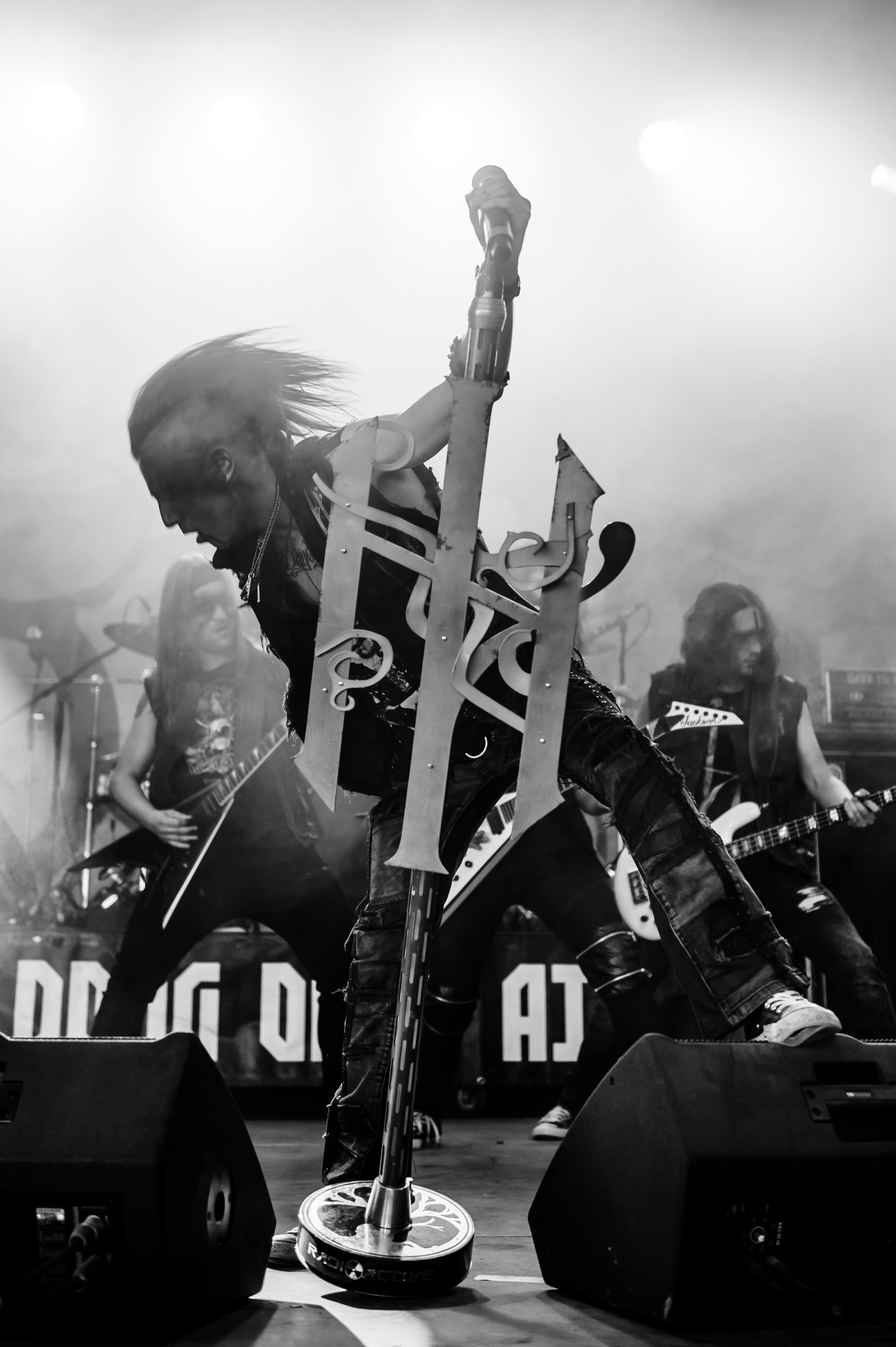 'Dong Open Air 2017; Neukirchen-Vluyn': 'Elvenking'